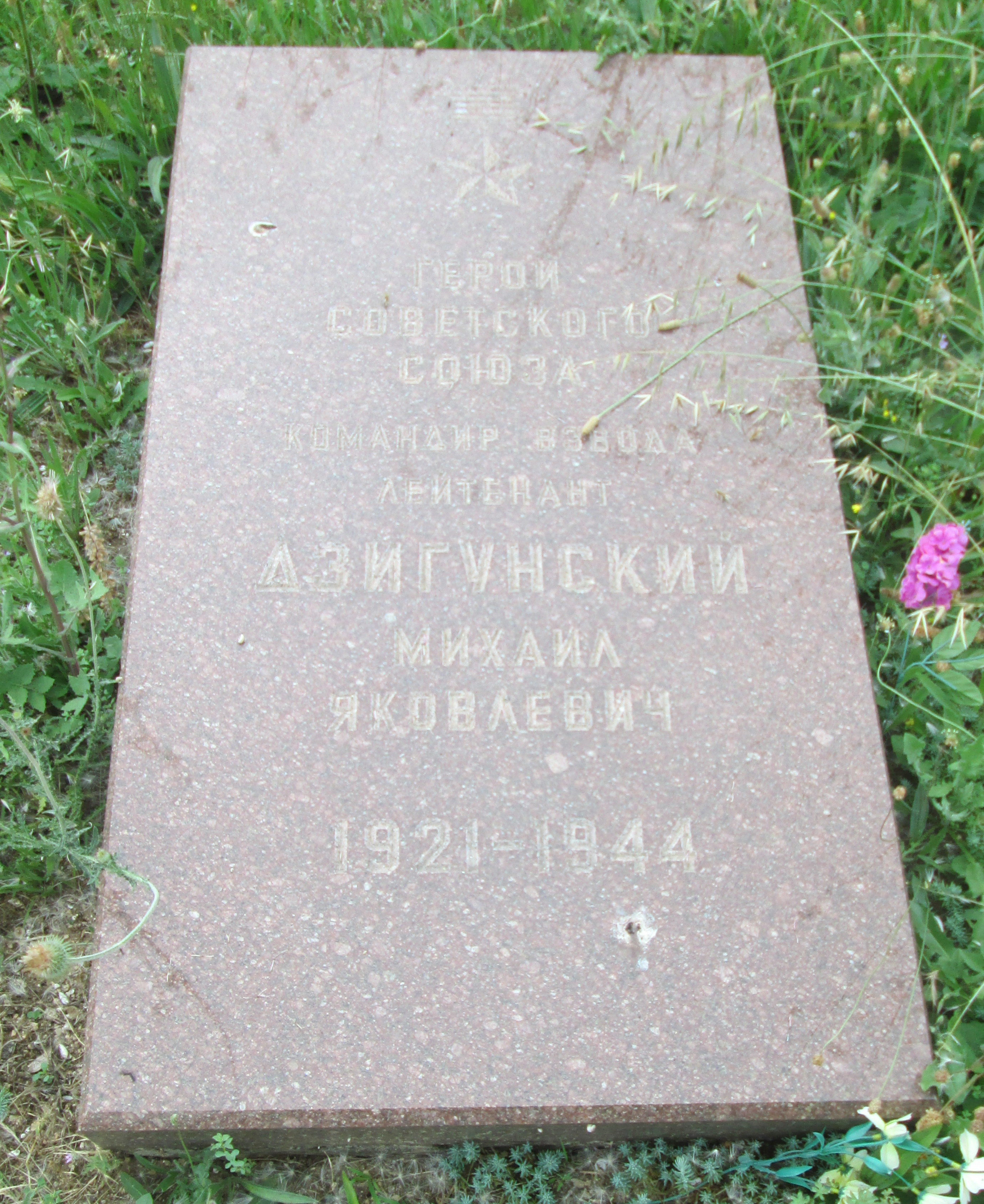 Могила учасника визволення Севастополя 1944, командира взводу 6-ї стрілецької роти 1372-го стрілецького полку 417-ї стрілецької дивізії 51-ї армії, Героя Радянського Союзу (1945), лейтенанта Дзигунського М. Я., 1944, Севастополь, Сімферопольське шосе. 6-й км. селище Дергачі.